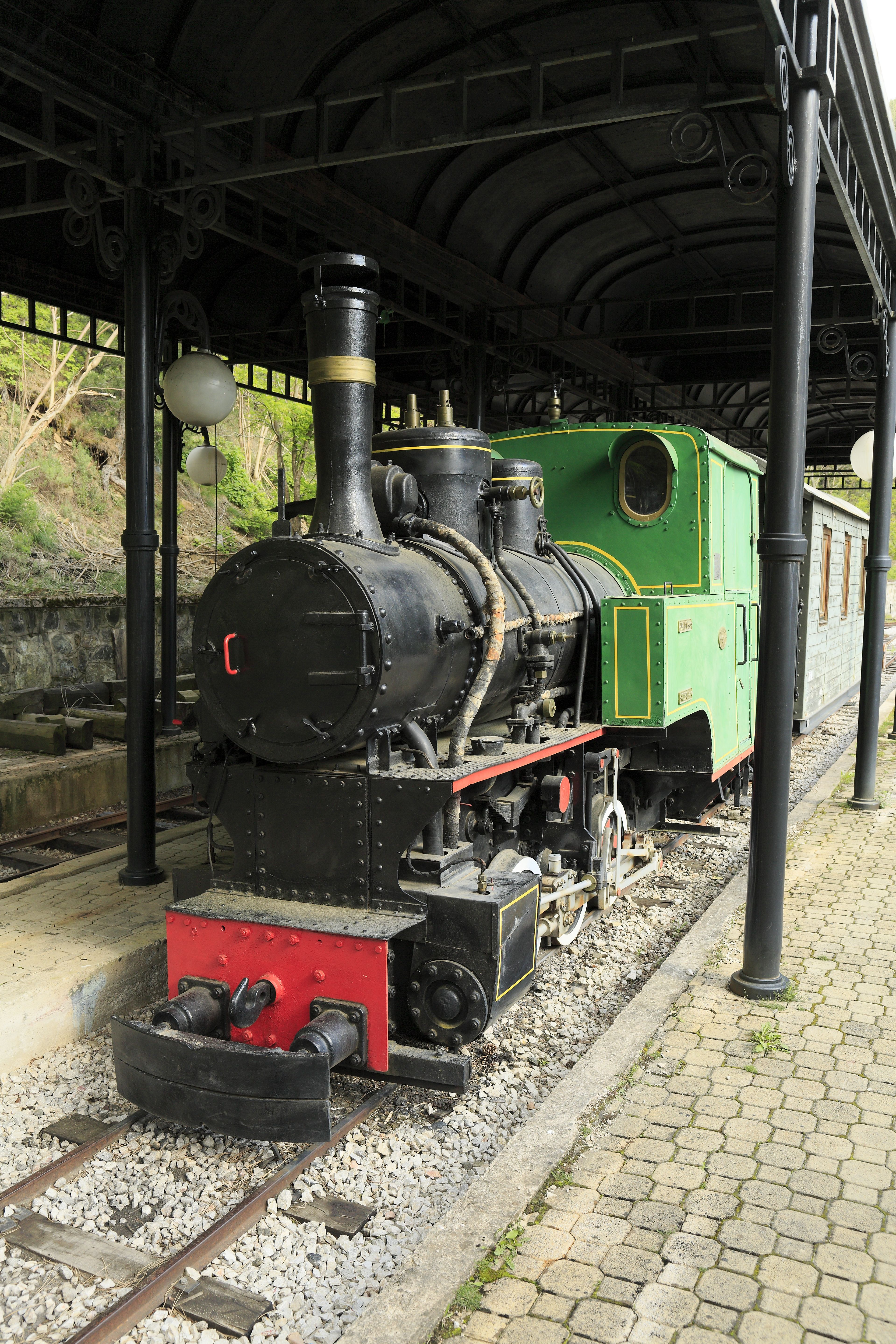 Cn2t mit tiefliegender Kupplung, ein typisches Feldbahnfahrzeug. Der Anstrich ist allerdings eher zivil.